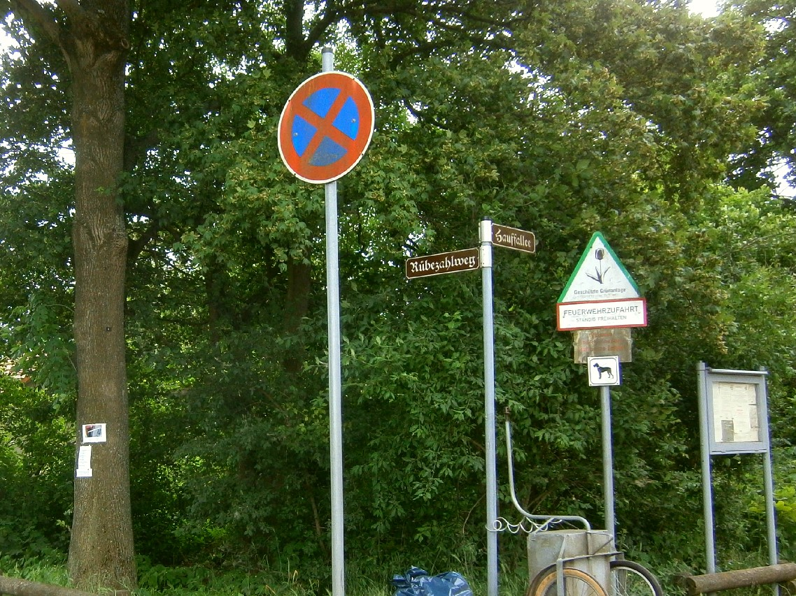 Rübezahlweg und Hauffallee sind Wege in der Gartenanlage Märchenland im Berliner Ortsteil Stadtrandsiedlung Malchow im Bezirk Pankow.